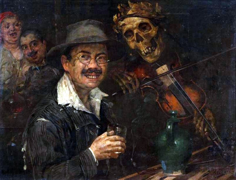 Self-portrait with Death, Stevan Aleksic, Muzeul de Artă Timişoara, Romania. Painted in 1919.